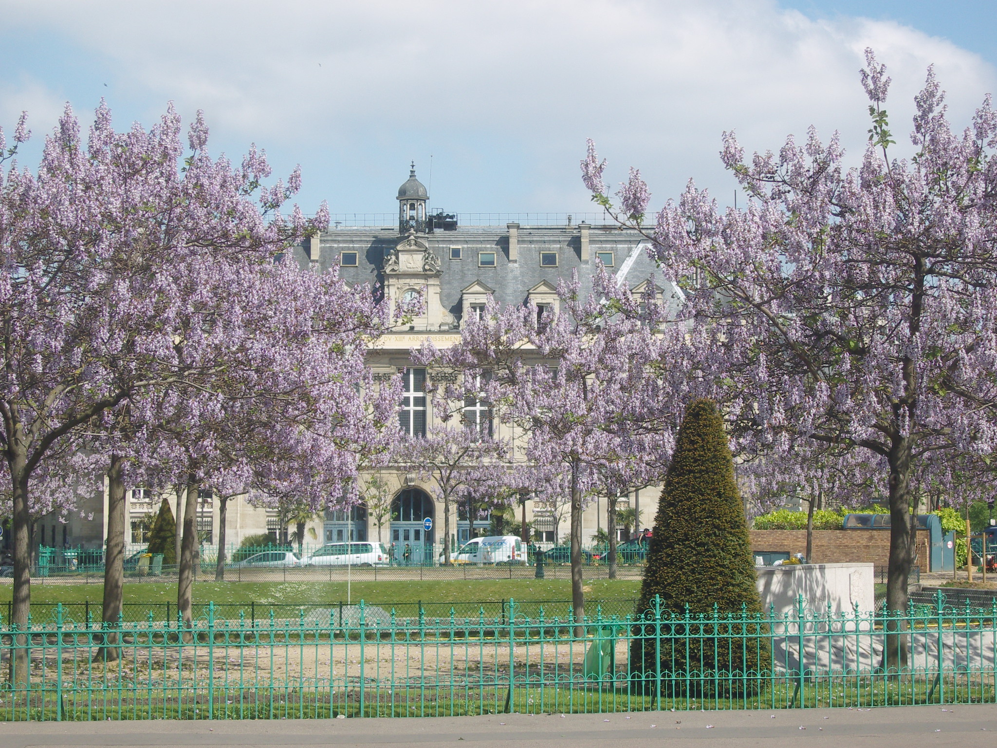 Paris, 13e arrondissement, place d'Italie, paulownias en fleurs.